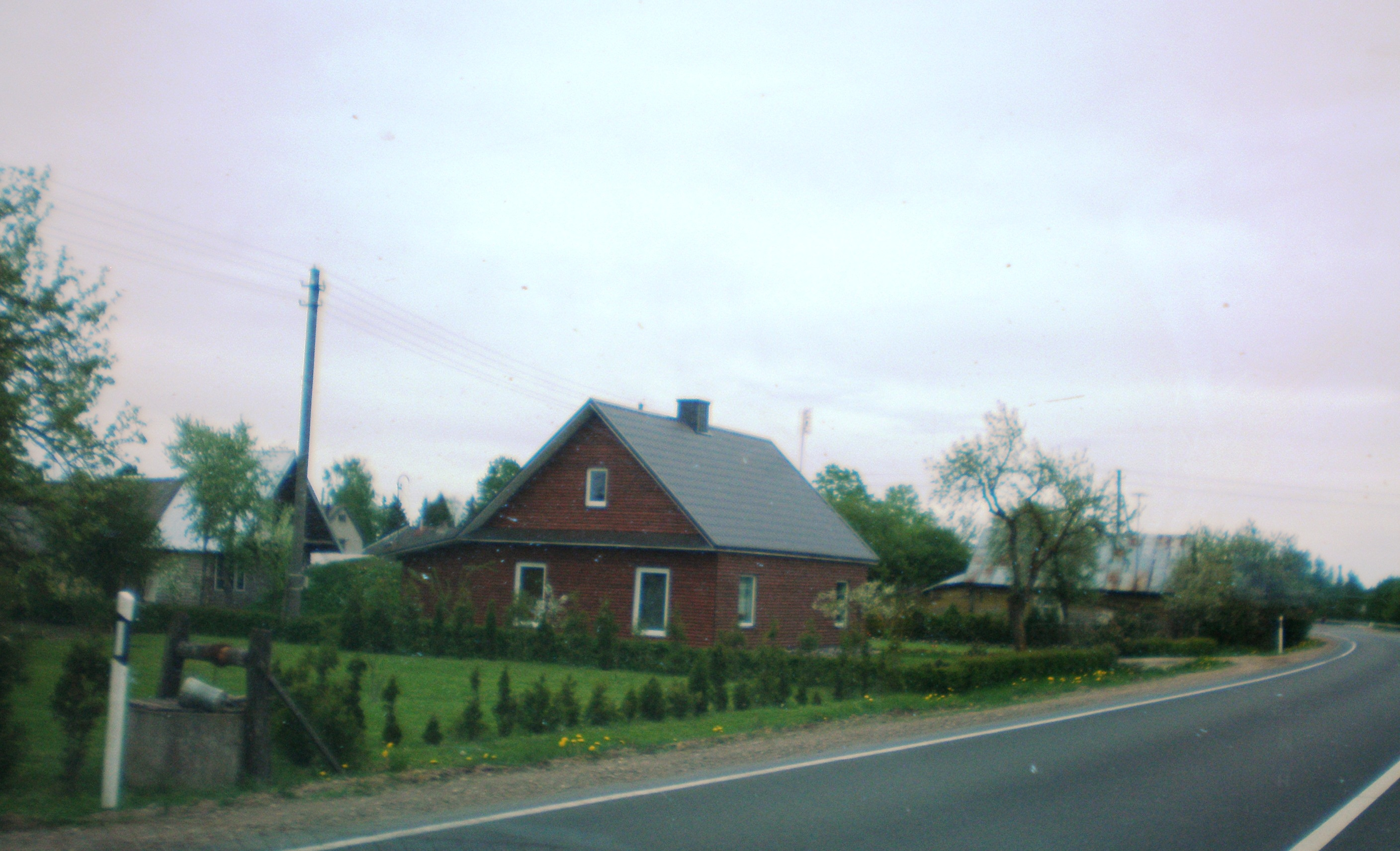 Bokštai, Kėdainių raj.